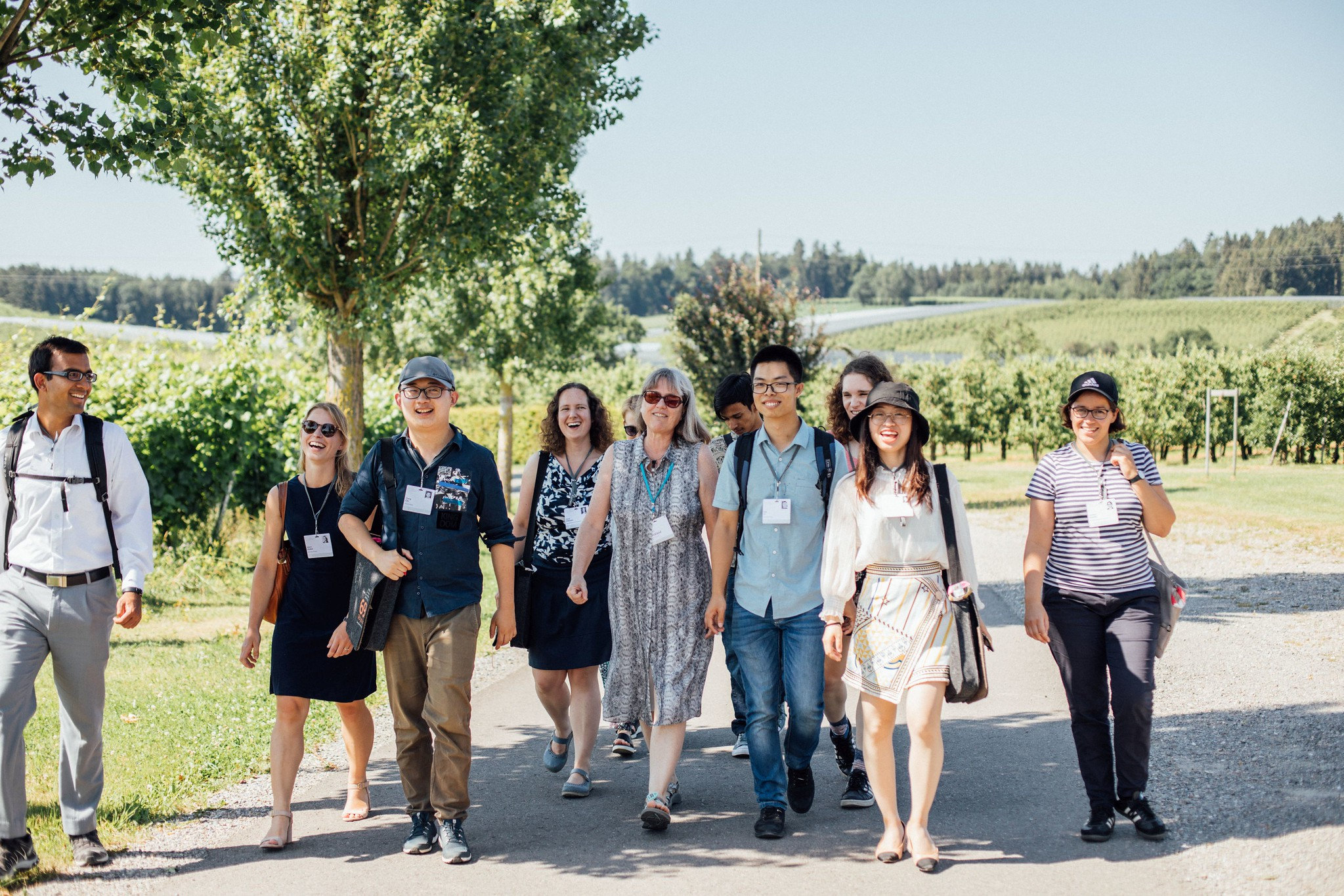 Nobelpreisträgerin Donna Strickland bei einem Science Walk mit Nachwuchswissenschaftlern